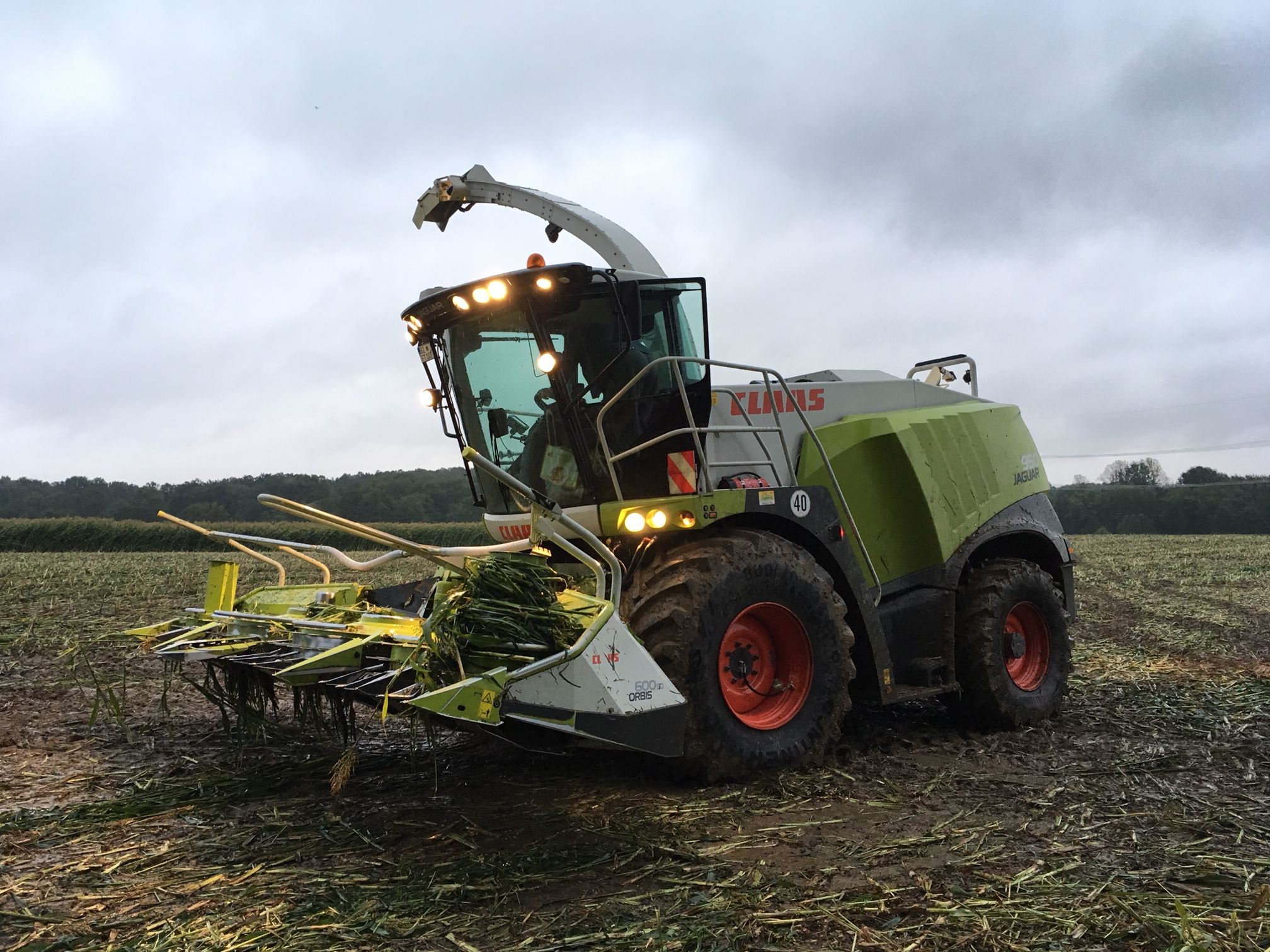 Feldhäcksler Claas Jaguar 950 bei der Hirseernte